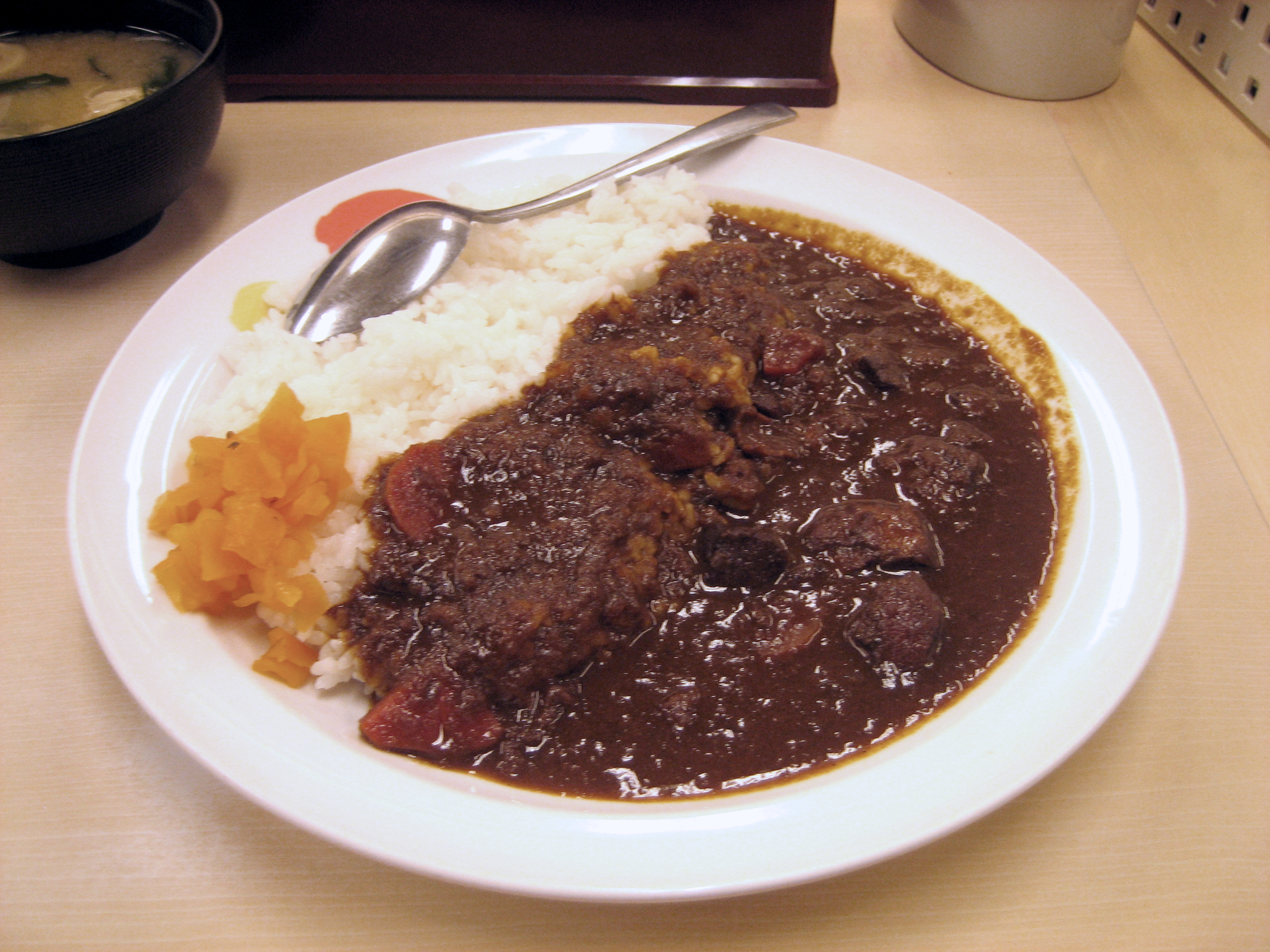 松屋フーズのオリジナルカレーライス（並盛り）。価格350円。